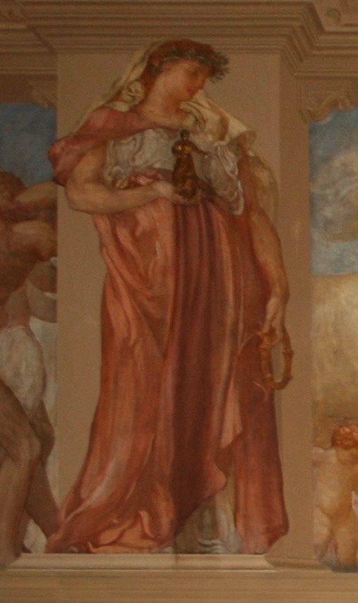 Dipinto di Adolfo de Carolis nel salone di rappresentanza, interno dell'alloggio prefettizio, del Palazzo del Governo di Ascoli Piceno. La dea Cupra intesa come rappresentazione della città romana. Questa divinità fu la protettrice dell'antico popolo dei Piceni e qui reca in mano un anellone a sei nodi e una piccola statua che sembra raffiguri la dea stessa, quale memoria e omaggio ai ritrovamenti archeologici che, all'inizio del XX secolo, vedevano luce dalle necropoli del territorio.Un sentito ringraziamento a S.E. il Prefetto di Ascoli Piceno Dott. Alberto Cifelli che, accordandomi il permesso di ingresso al salone, ha consentito lo scatto di questa immagine.